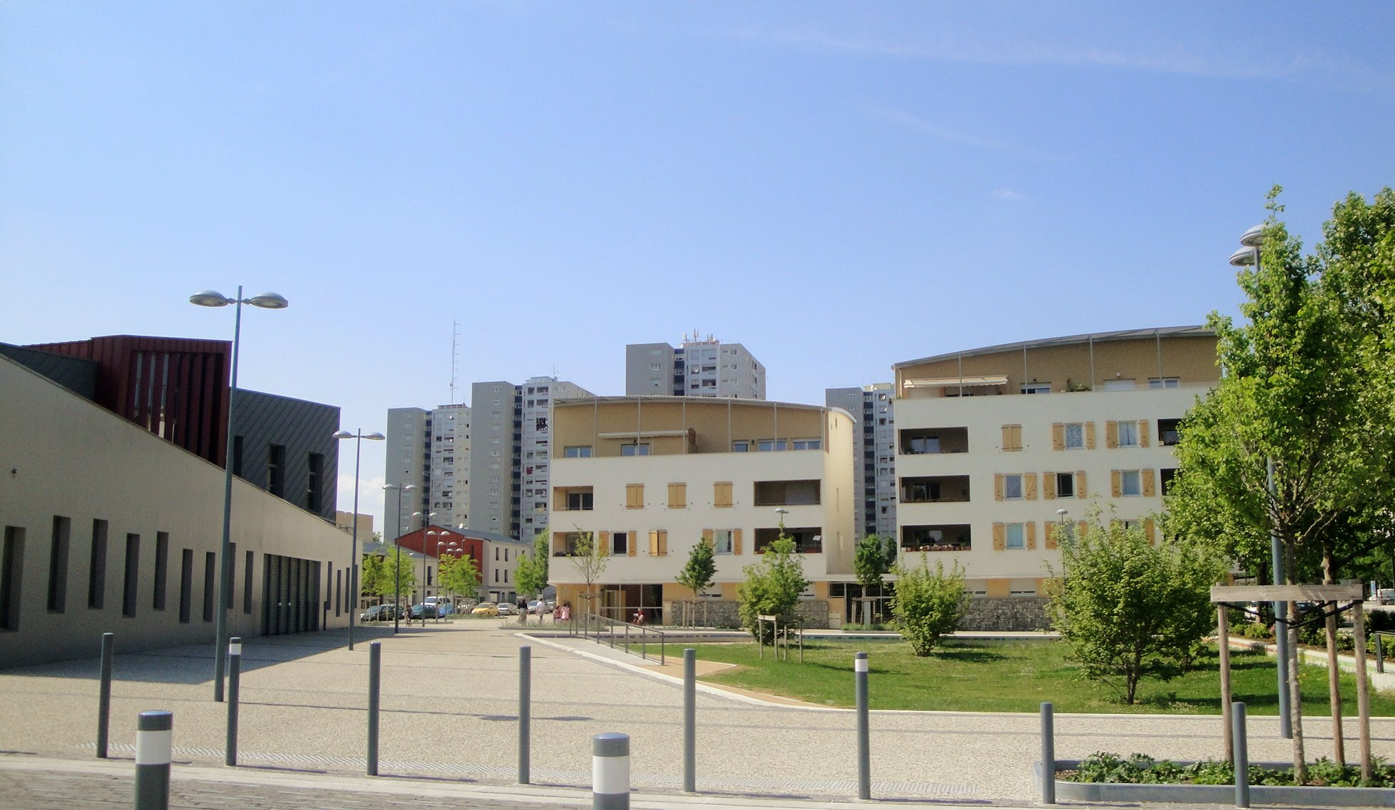 Quartier du cerisier aux Minguettes.